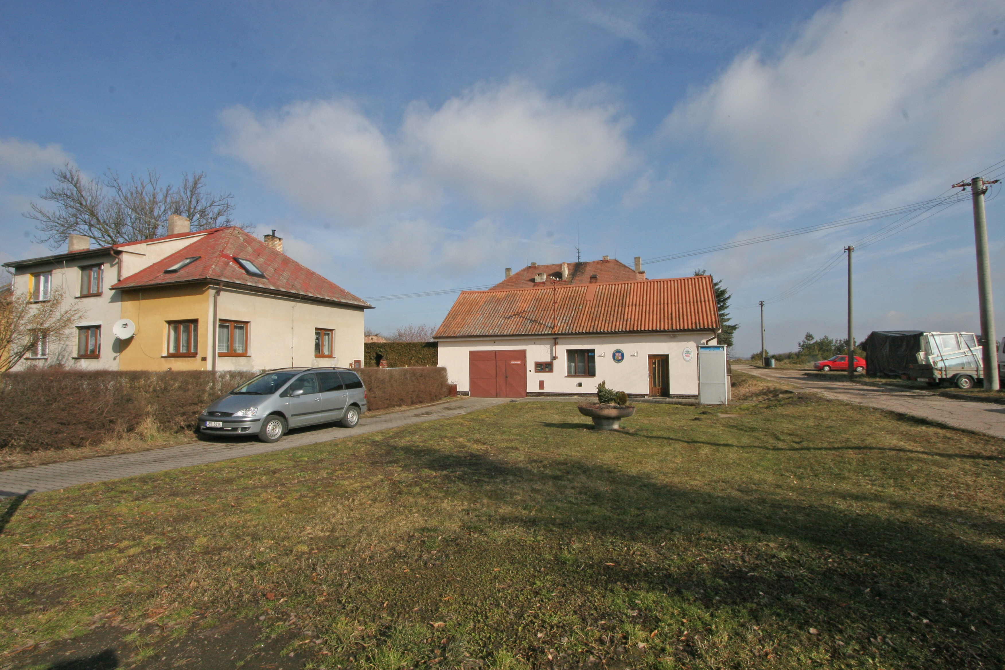 Podůlšany obecní úřad